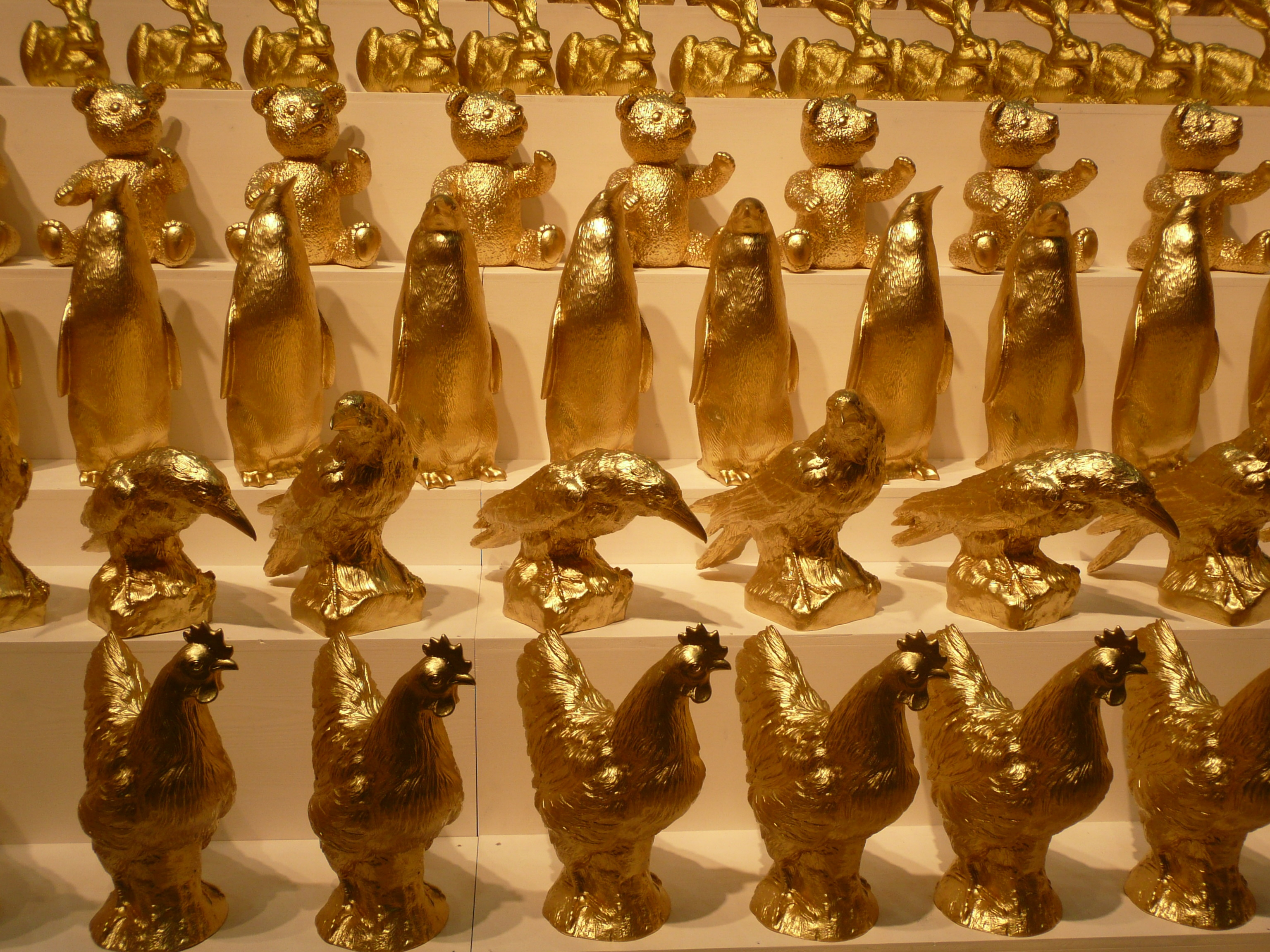 Dürer-Hase als geklonter Goldhase [Otmar Hörl)